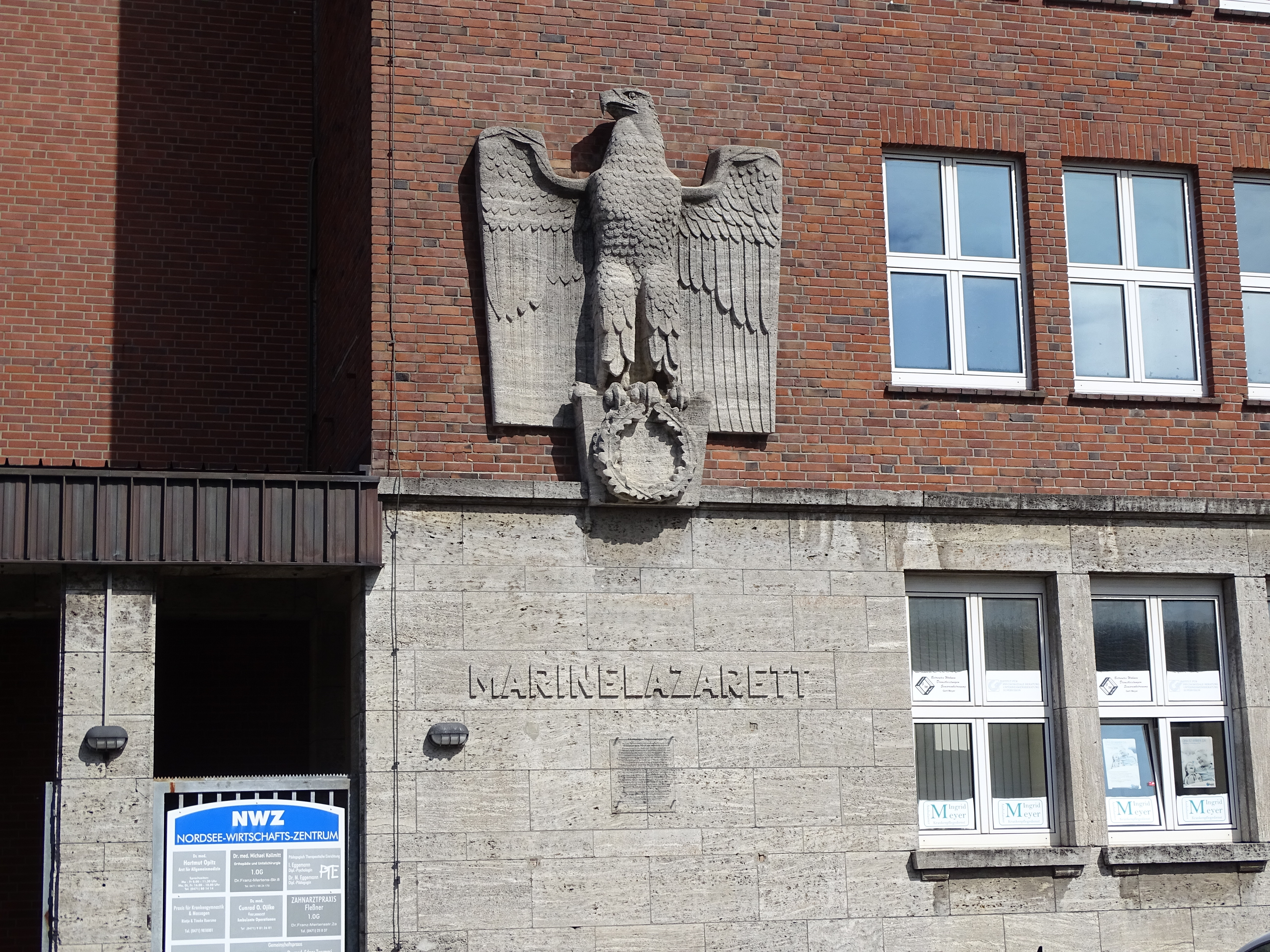 Reichsadler am Eingang des ehemaligen Marinelazaretts Bremerhaven an der Dr.-Franz-Mertens-Straße in Lehe